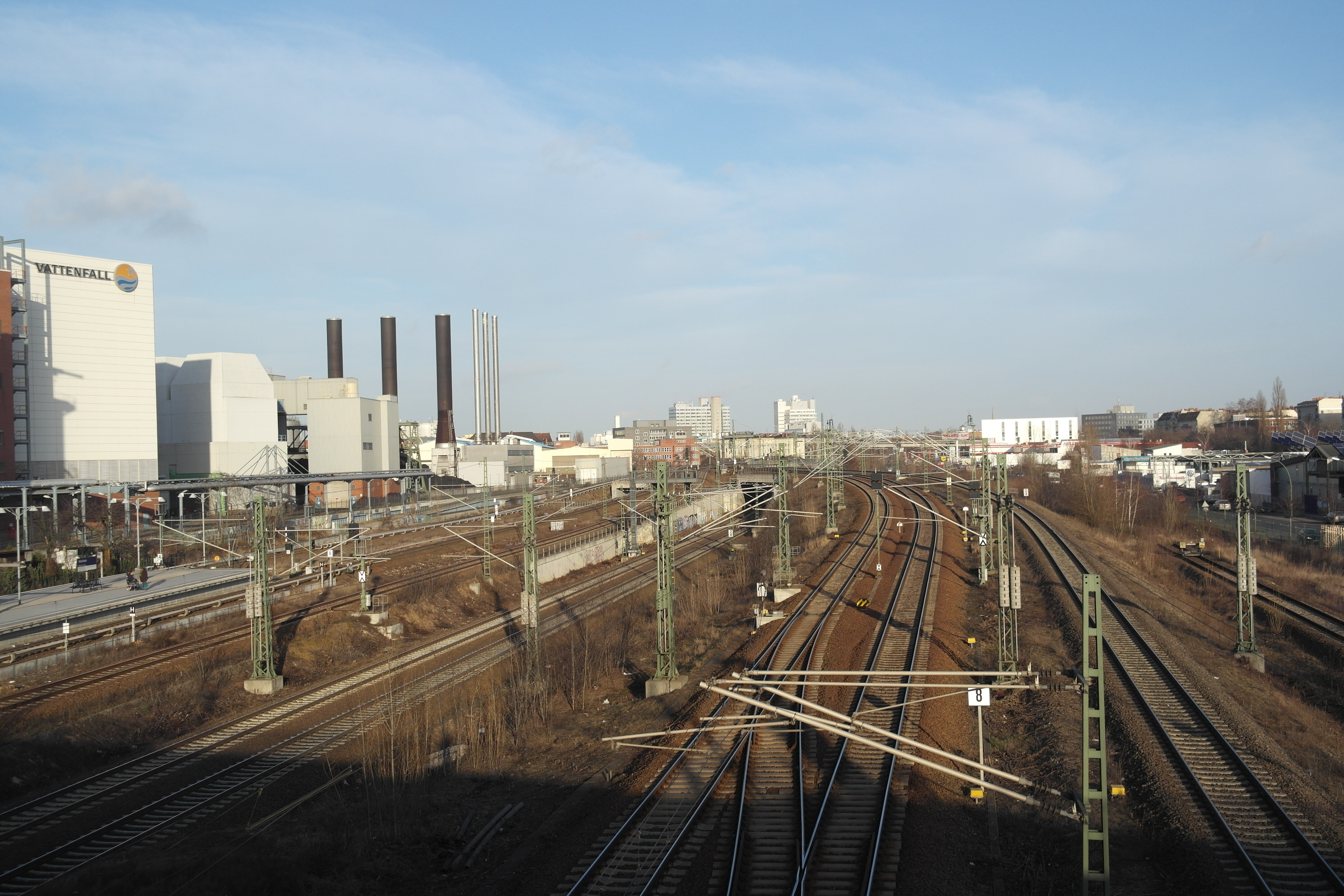 Östlicher Teil des Bahnhofs Berlin-Moabit von der Putlitzbrücke, Trennung der Strecken zum Berliner Hauptbahnhof und zur Ringbahn